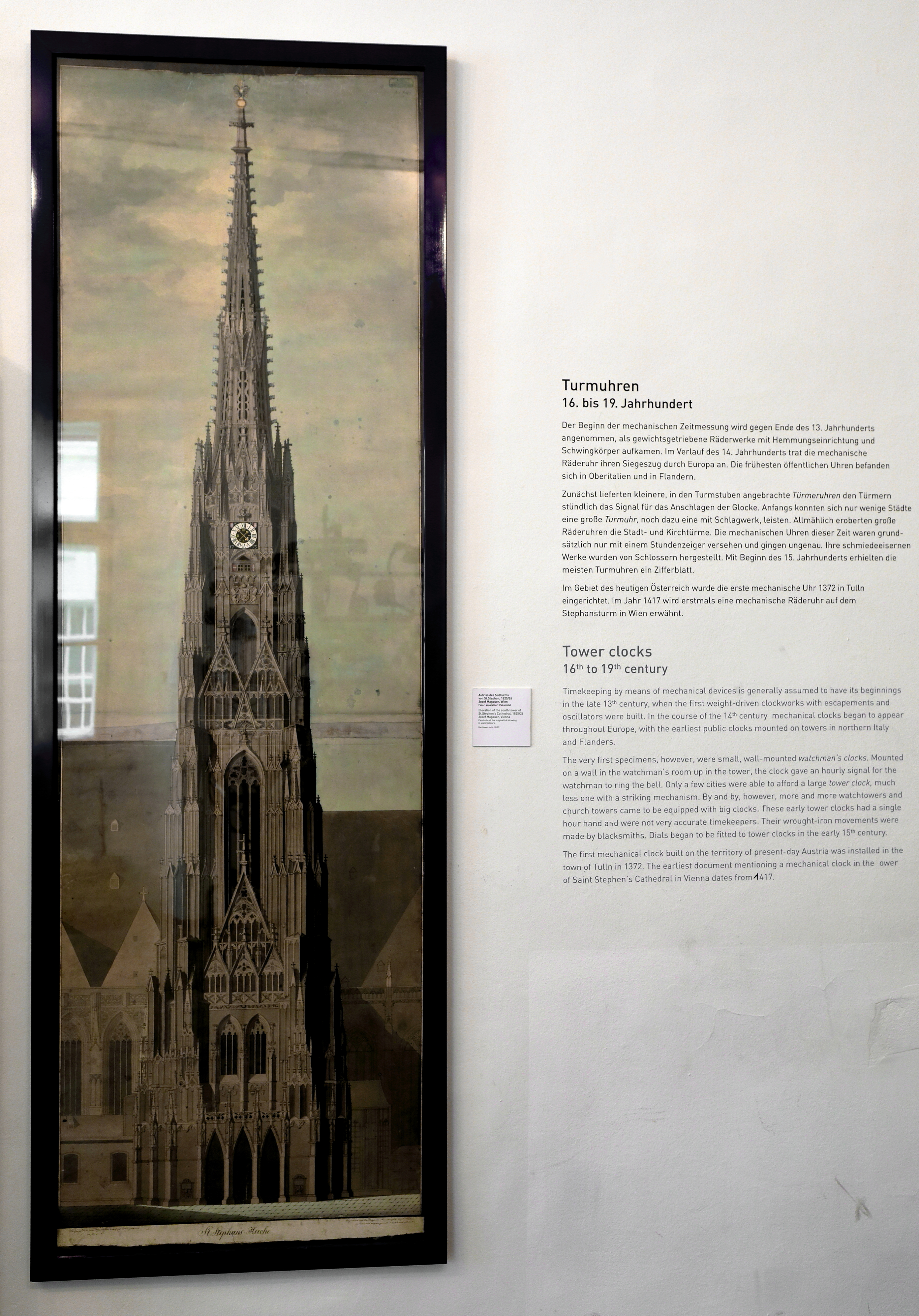 Federzeichnung vom Südturm des Stephansdomes in der österreichischen Bundeshauptstadt Wien. Die colorierte Aufrisszeichnung malte 1825/26 ein Josef Magauer und zeigt den Südturm noch mit einer Turmuhr. Seit 1861 ist der Südturm ohne Turmuhr, nachdem man diese im Zuge der Turmrestaurierung ersatzlos entfernte.